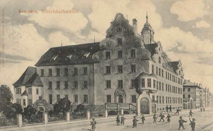 Wittelsbacher Schule nach dem Bau, ca 1907